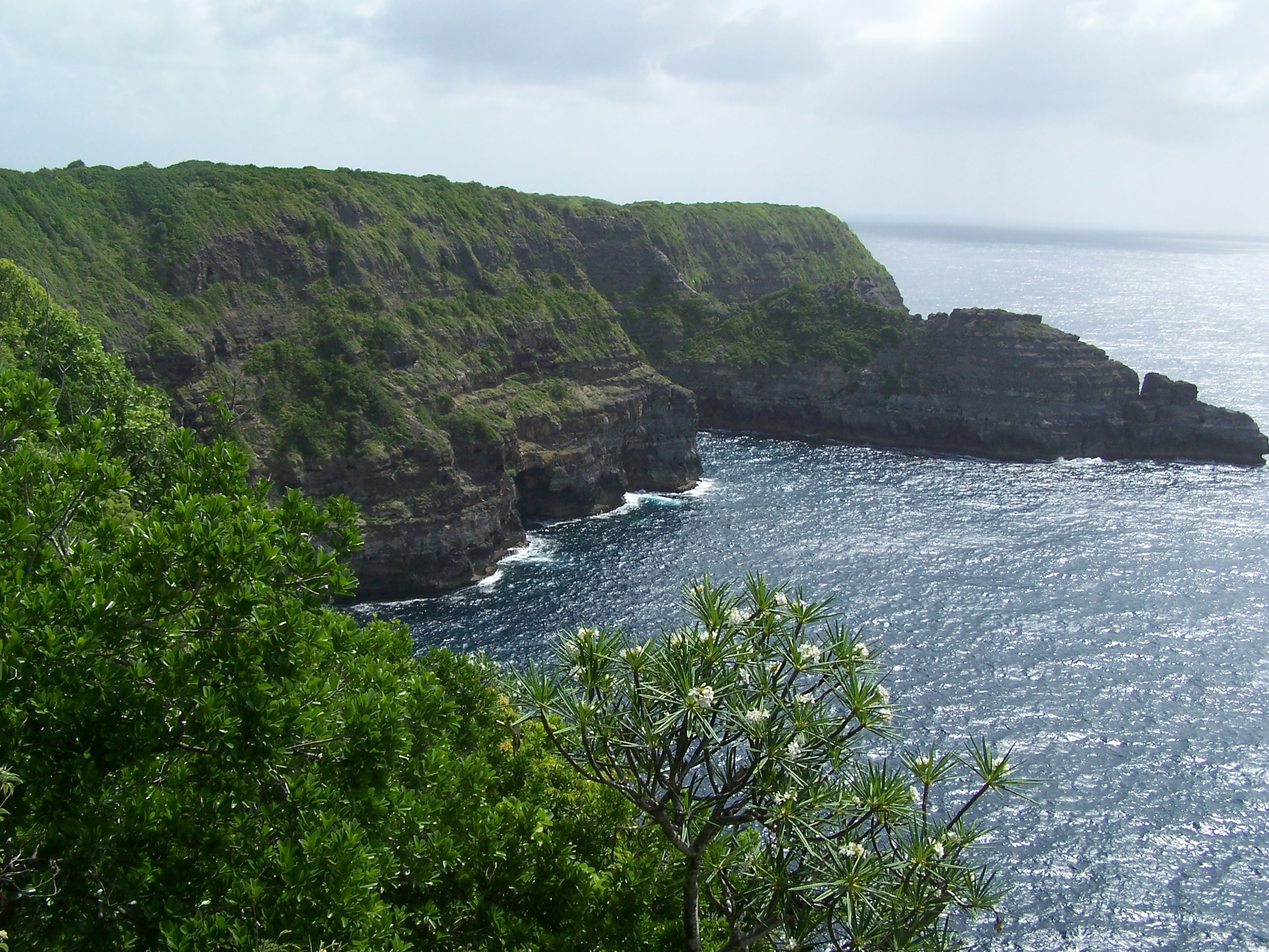 Pointe de la Petite-Tortue sur Grande-Terre, Guadeloupe